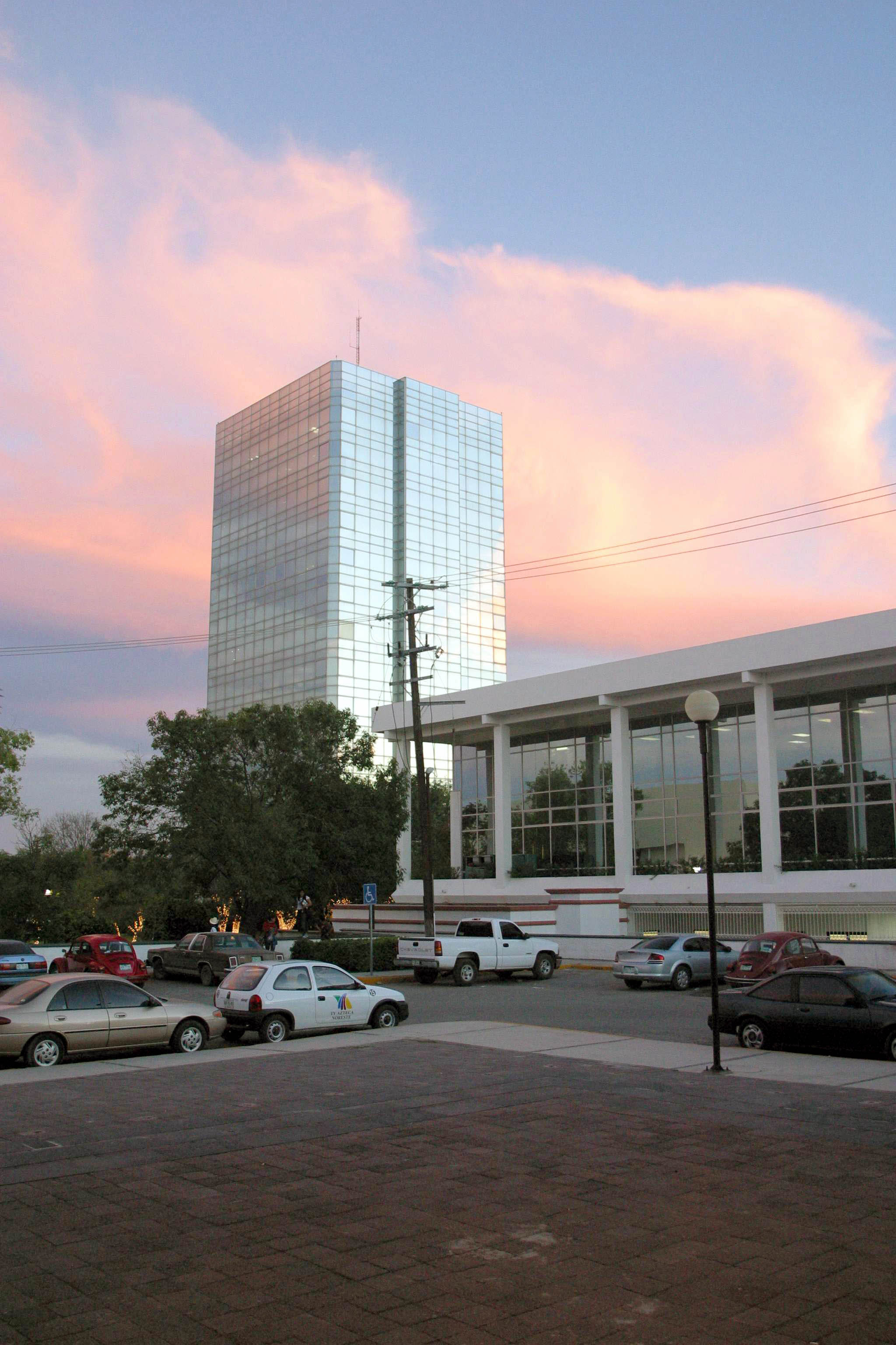 Torre de Gobierno, sede de oficinas del Gobierno del Estado de Tamaulipas, en el noreste de México